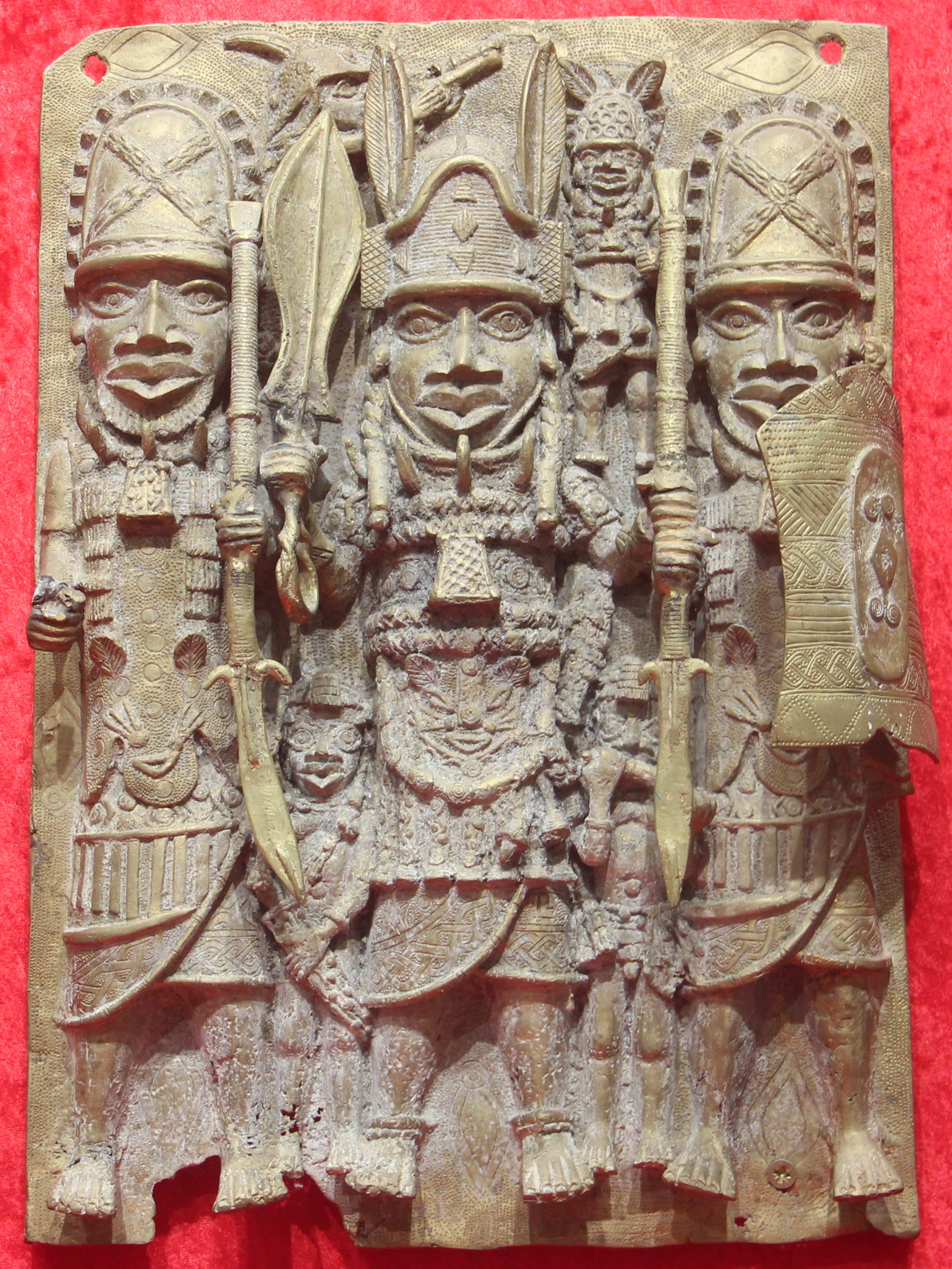 Plaque de bronze représentant Oba Ozolua se préparant à la guerre. Musée des Civilisations Noires de Dakar (Sénégal).